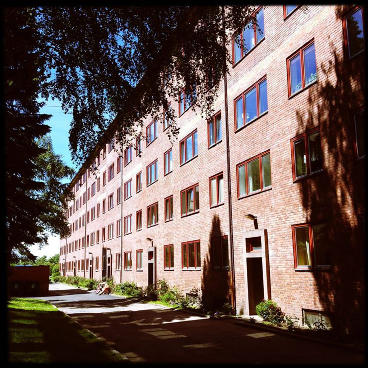 Myrahagen borettslag, 4 OBOS-blokker i Bentsebrugata 16–18 tegnet av Jens Dunker. Tekst i Digitalt museum: «Dette er et typisk OBOS-borettslag i tegl, langstrakt og enkelt, men gode, solide boliger. Beliggenheten gir sol, lys, luft og grønne, beplantede uterom. Det er 179 leiligheter: 44 3-roms, 99 2-roms, 36 1-roms, alle med kjøkken og bad. Anlegget var forsynt med tidens moderne fasiliteter: Sentralvarmeanlegg, sentral varmtvannsforsyning, søppelnedkast, maskinvaskeri, og til og med fellesantenne for radio. Leilighetene ble utstyrt med elektriske komfyrer og "elektrisk utstyr til kjøkken, entreer og bad". Noen av leilighetene fikk balkong - i dag har alle fått. Opprinnelig innskudd for 1-roms var 1550,- og for 3-roms 3100,-»